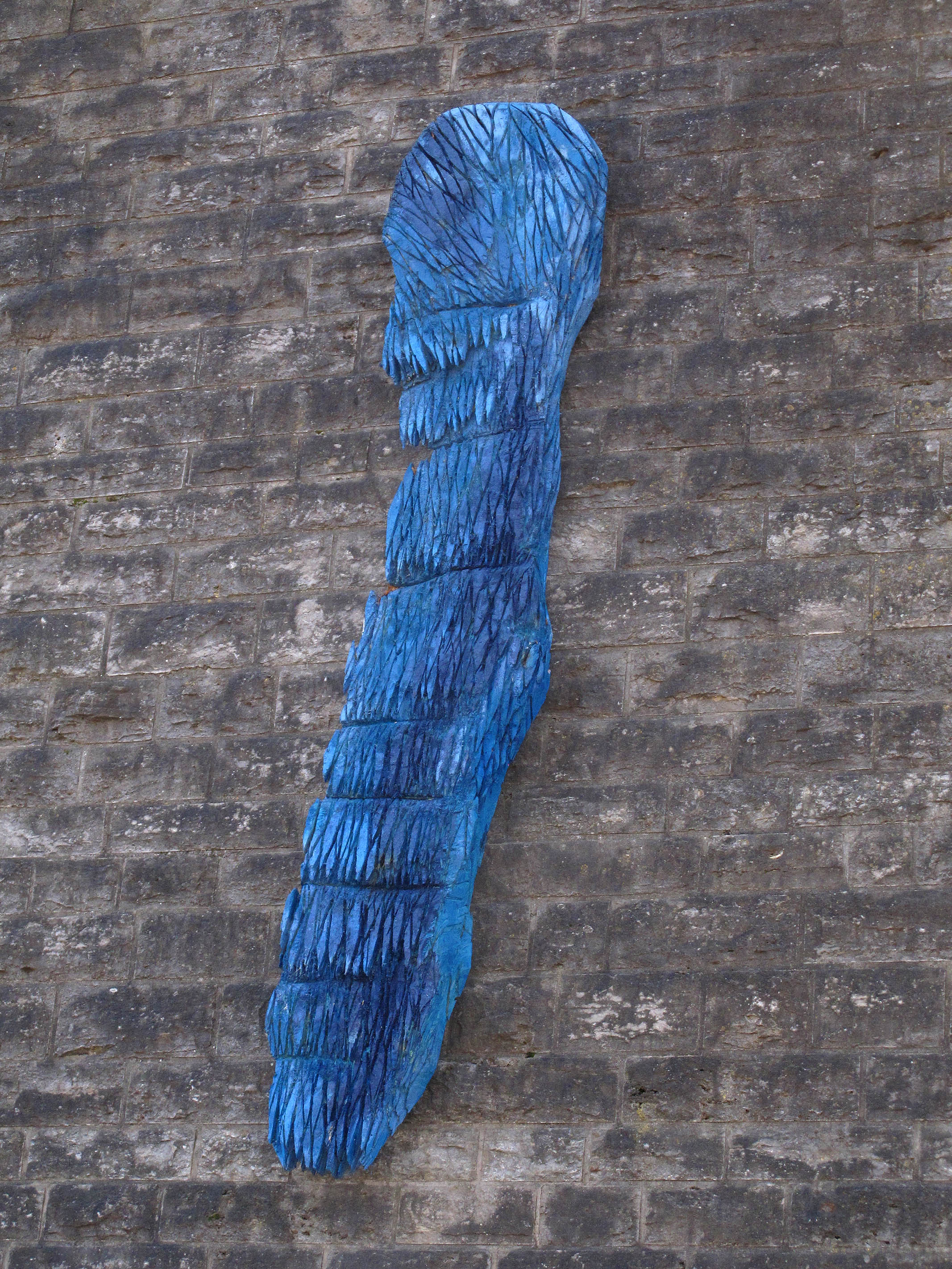 Heike Endemann, Wasser fällt, 2011, - Deutschland, Baden-Württemberg, Horb am Neckar, Wand unterhalb der Hornaustraße am Neckartal-Radweg